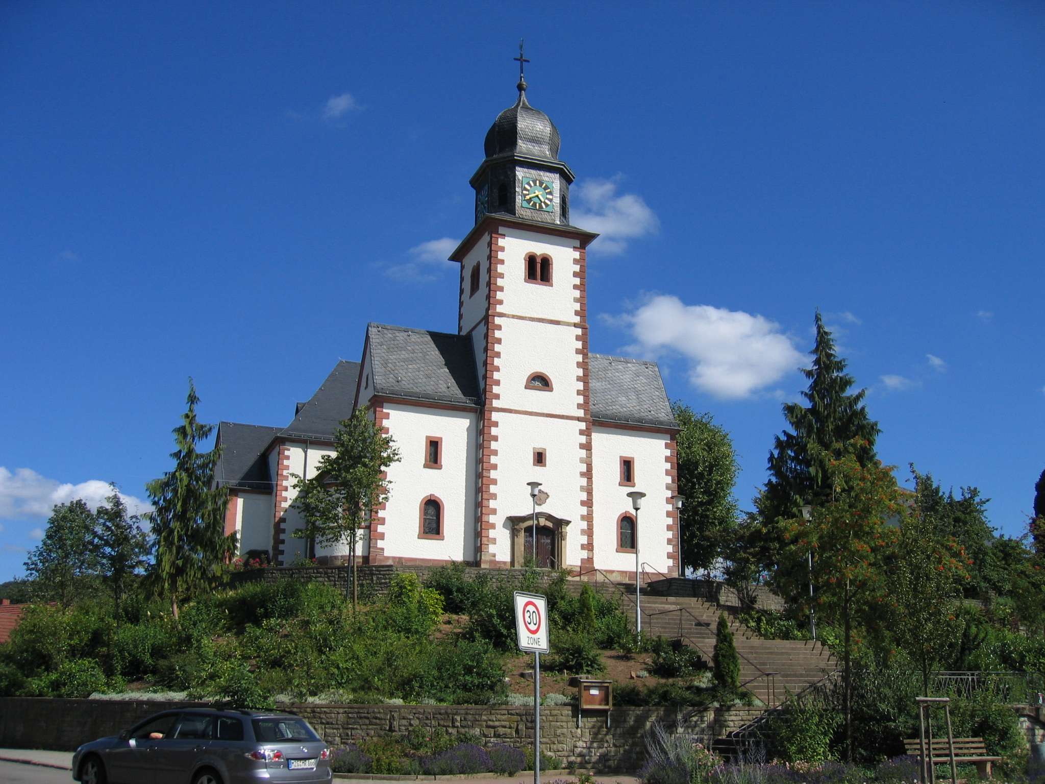 Dillinger Straße 1, kath. Pfarrkirche St. Helena mit Ausstattung, 18. Jh., Erweiterung 1927–28 (Einzeldenkmal)